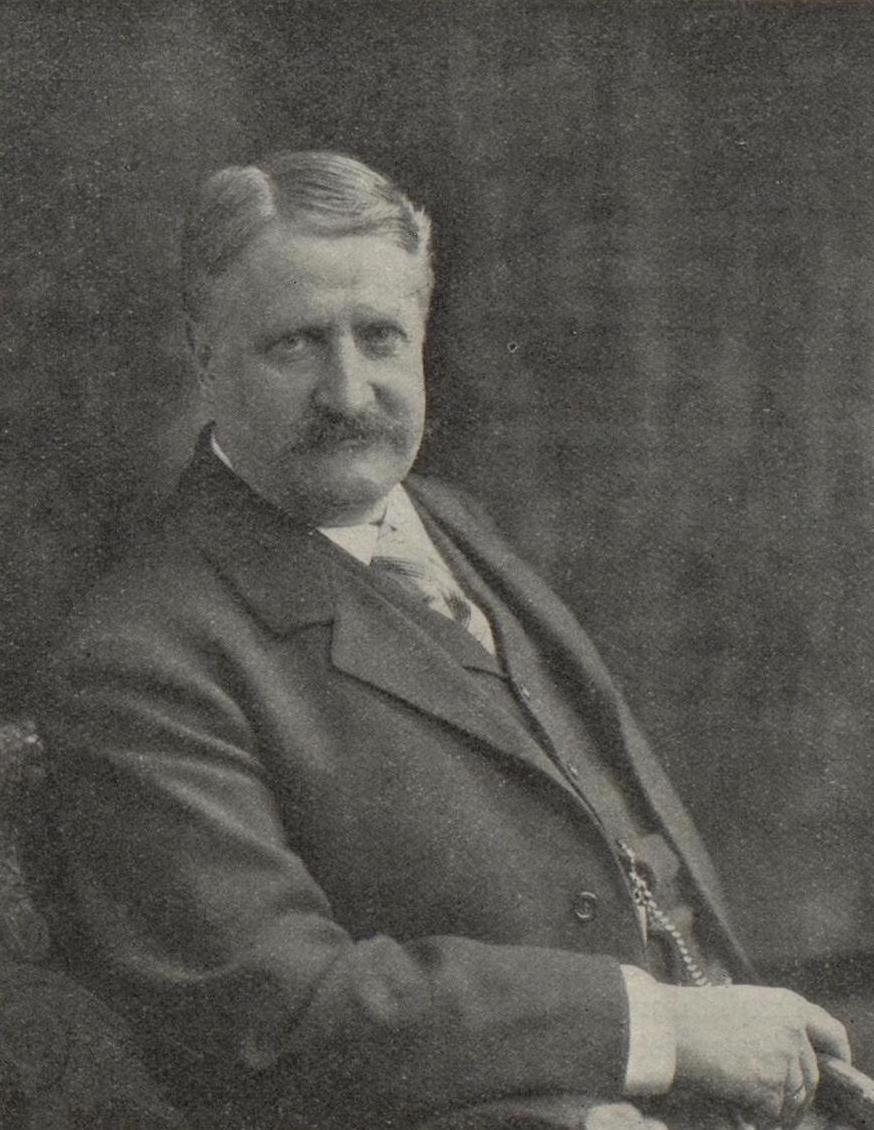 Porträtfoto von Konrad Reimer